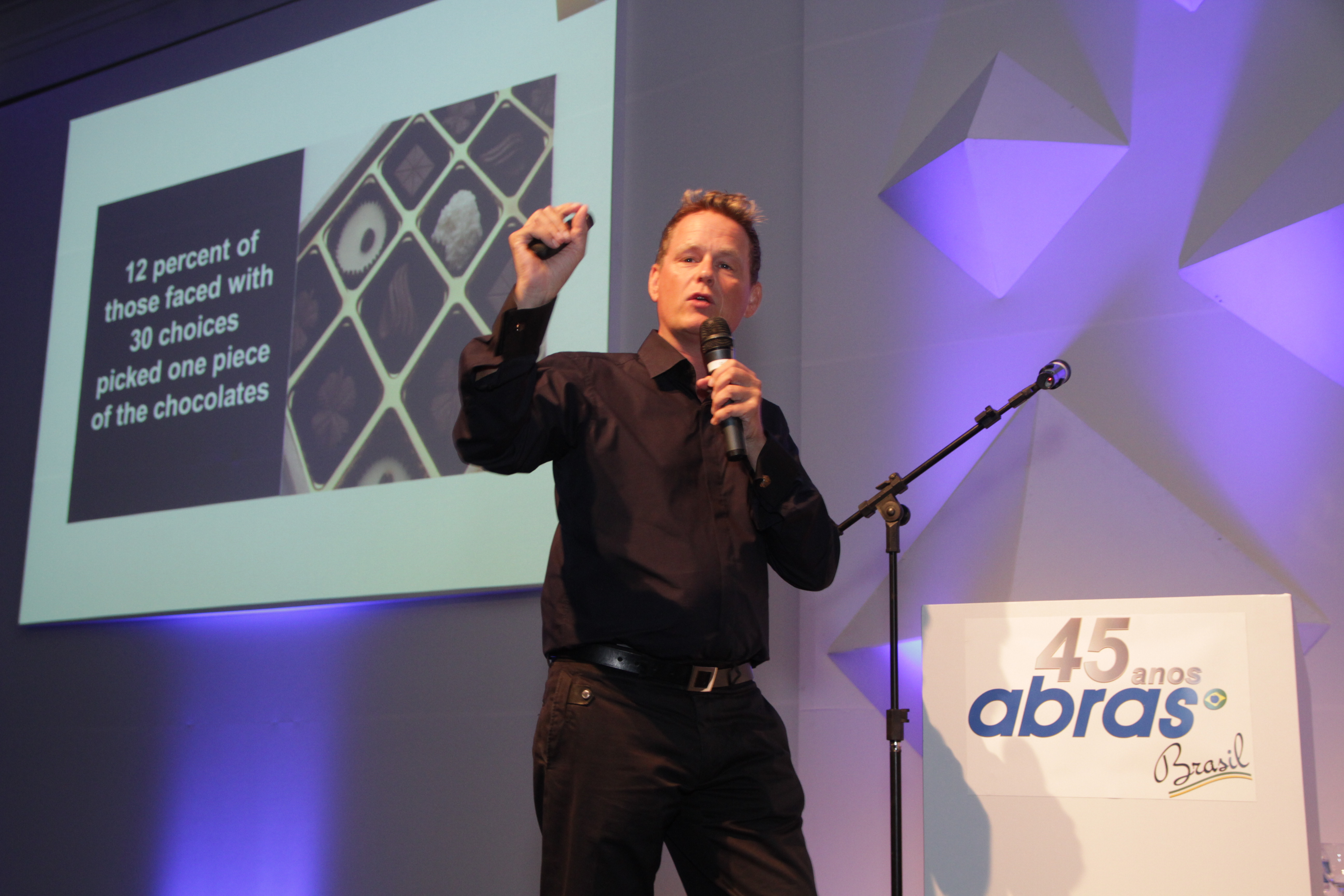 Martin Lindstrom, palestrante internacional da 47ª Convenção ABRAS